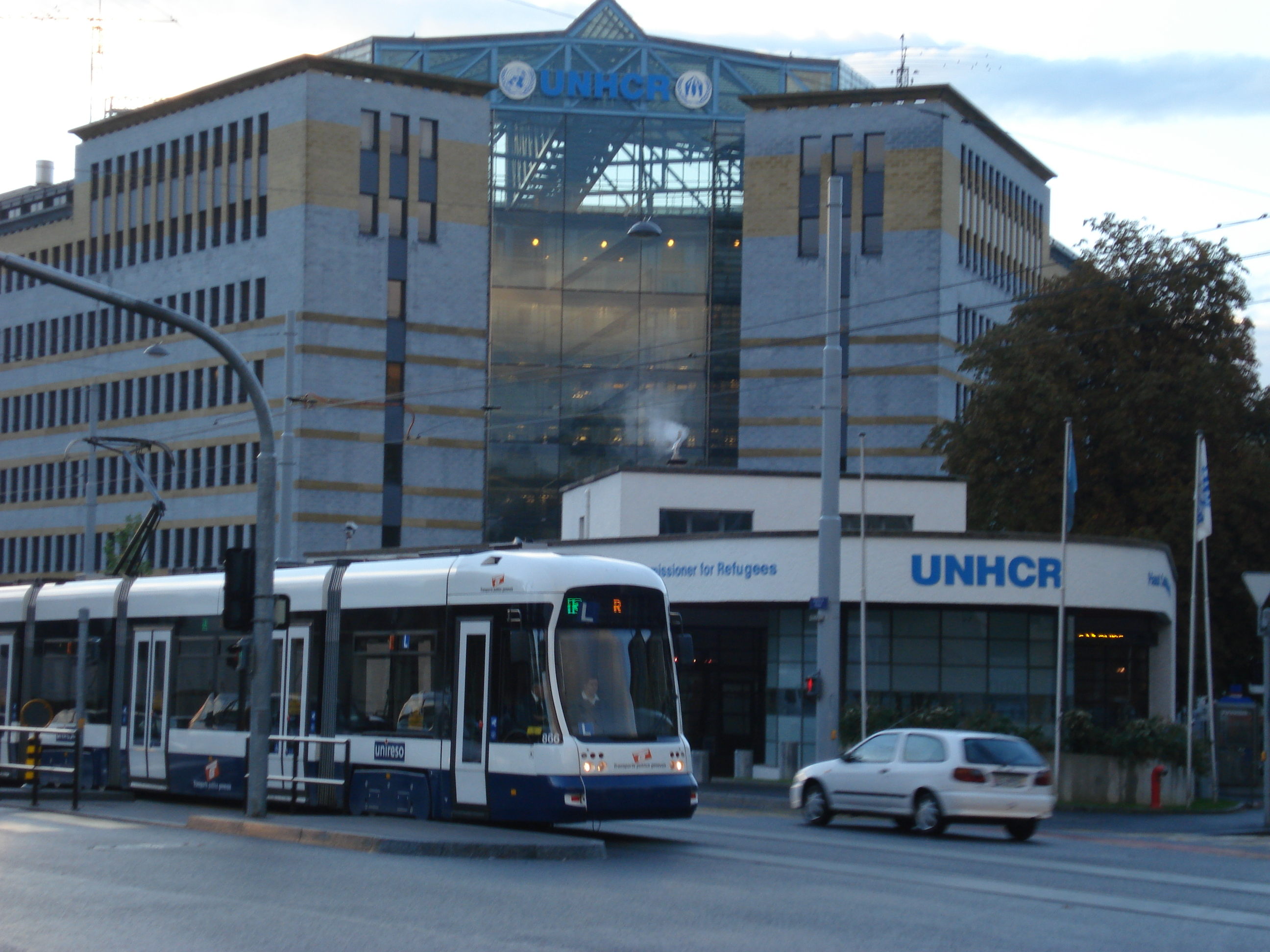 Avenue de France, UNHRC Building, Geneva